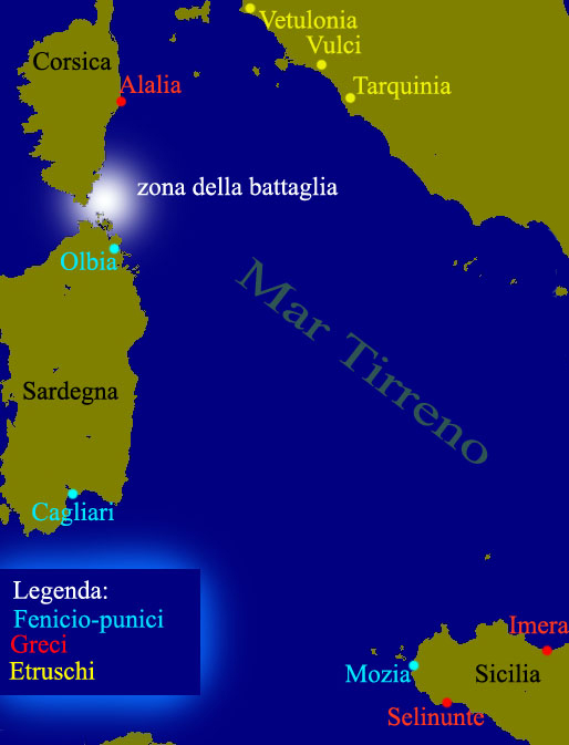 Mappa del Tirreno con alcune città etrusche, greche e fenicio-puniche. Luogo della battaglia di Alalia, 540 a.C.